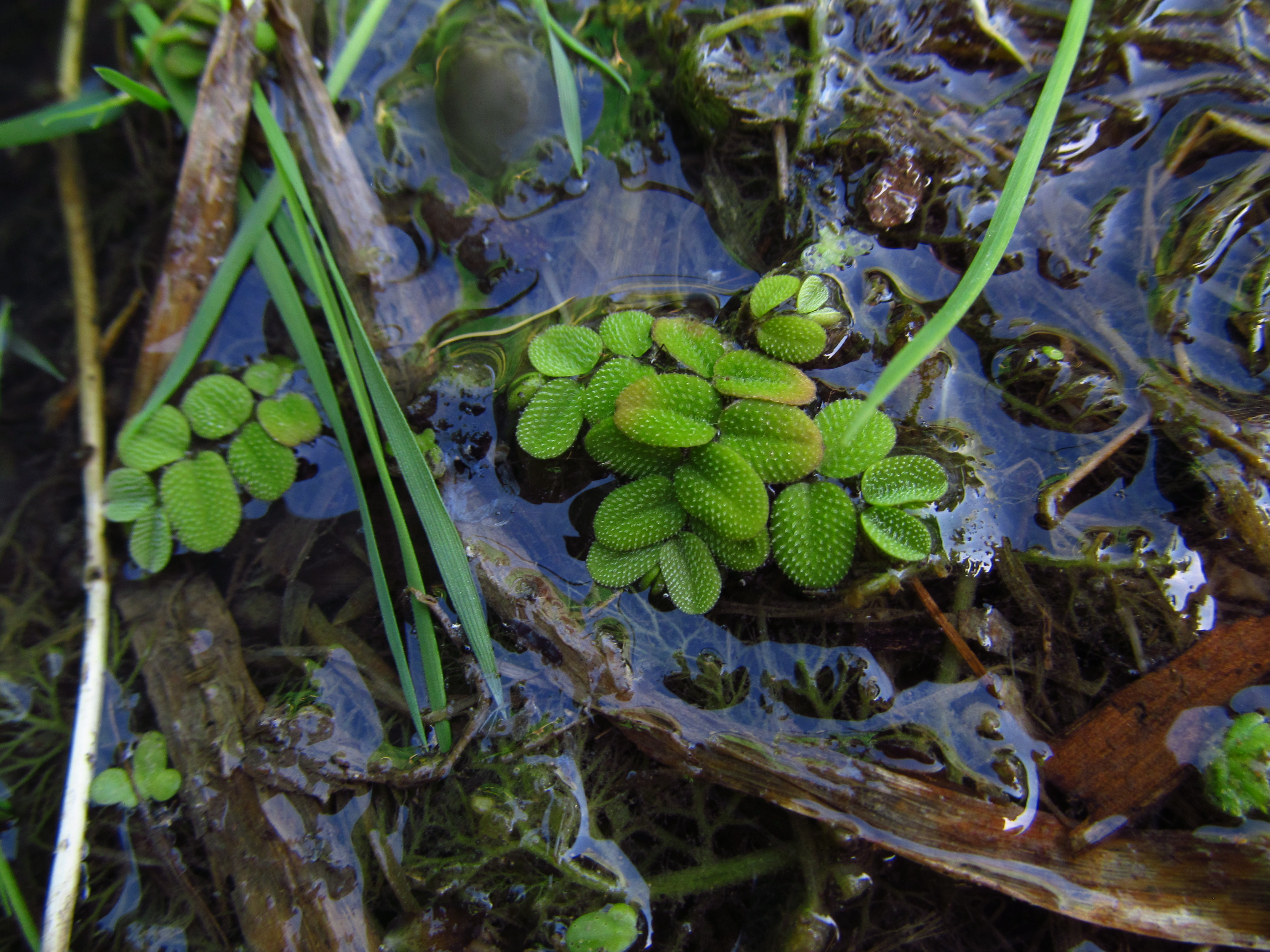 Srpski (latinica): vodena paprat (Salvinia natans)